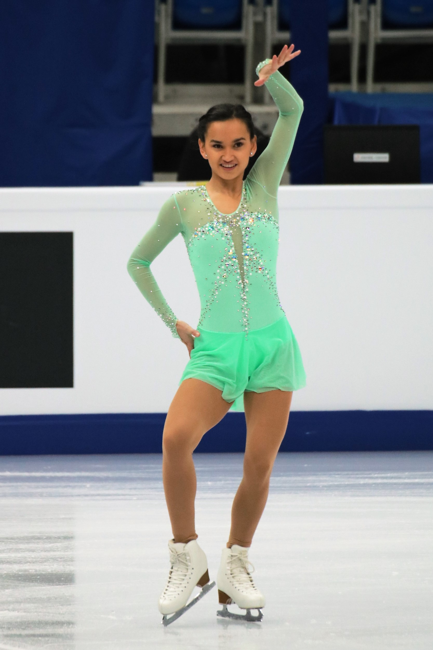 Анне-Лине Йерсем (Норвегия) на Чемпионате Европы по фигурному катанию 2018.